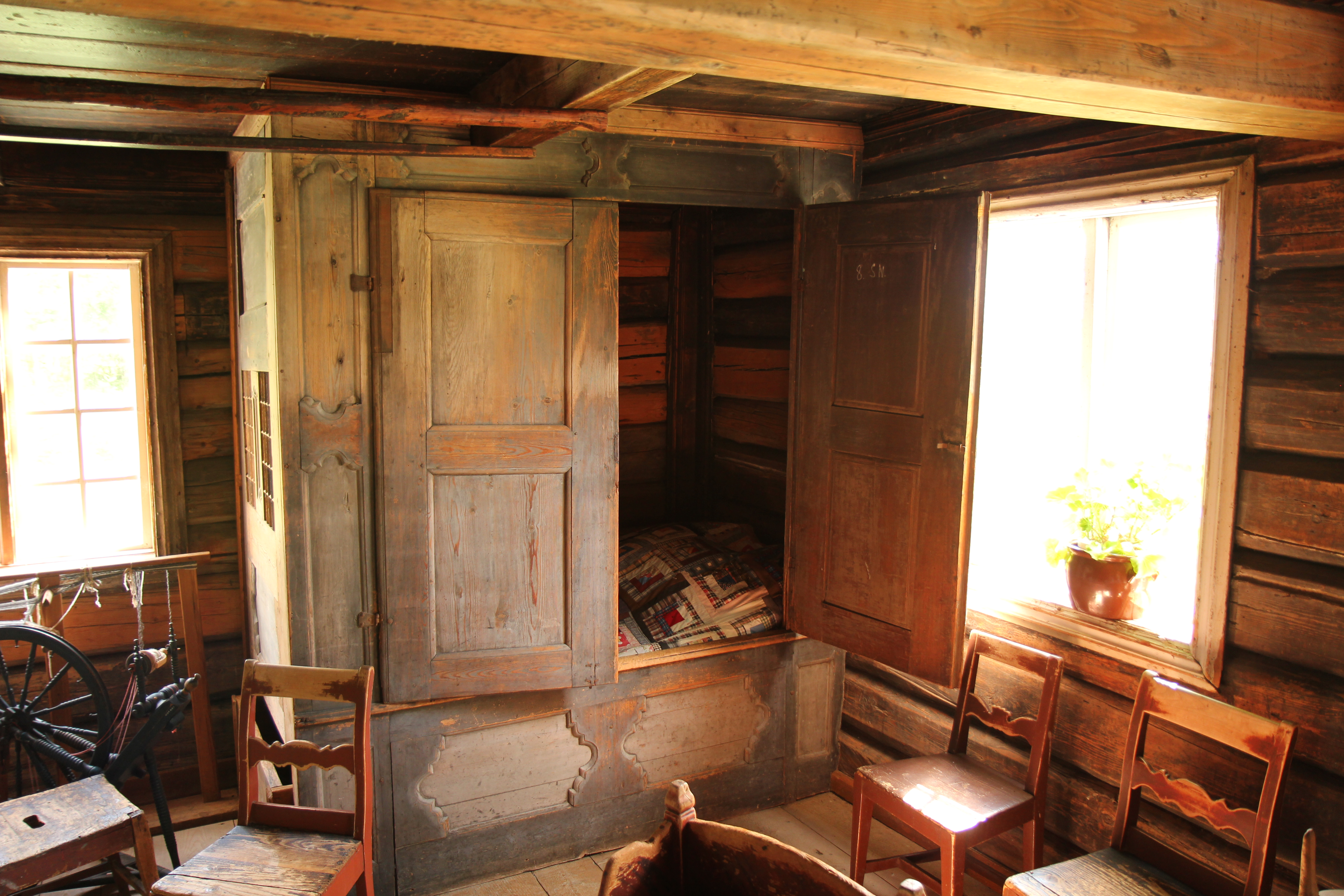 Skap-seng i stuebygningen fra Øver Engum på Eiktunet